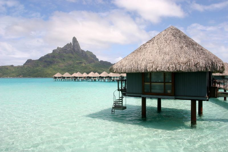 Bora-Bora, Îles sous le Vent, Polynésie Française